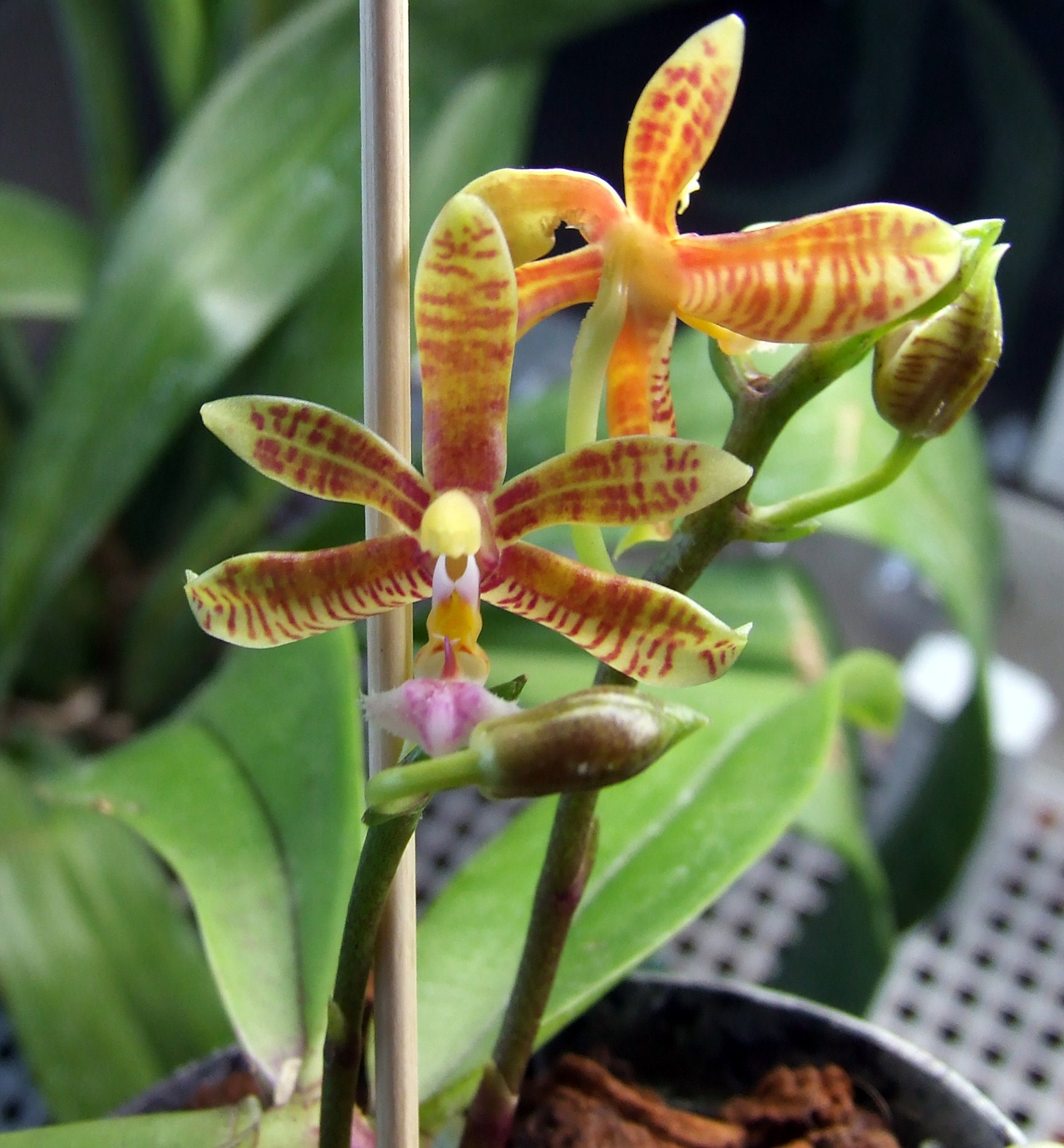 Phalaenopsis mannii hybrid Flower